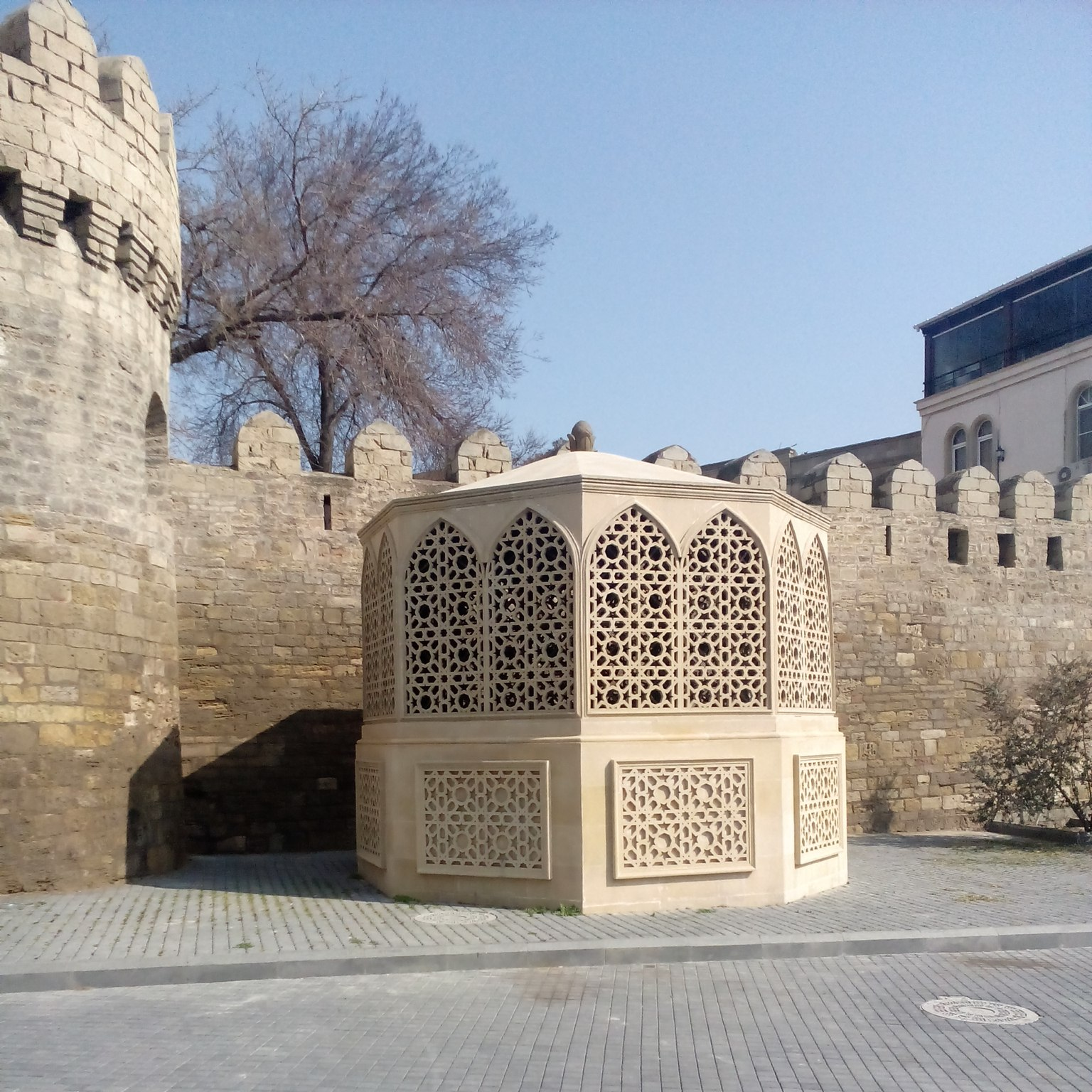 Оголовок вентиляционной шахты метрополитена вблизи станции Ичери-Шехер в г. Баку, Азербайджан.